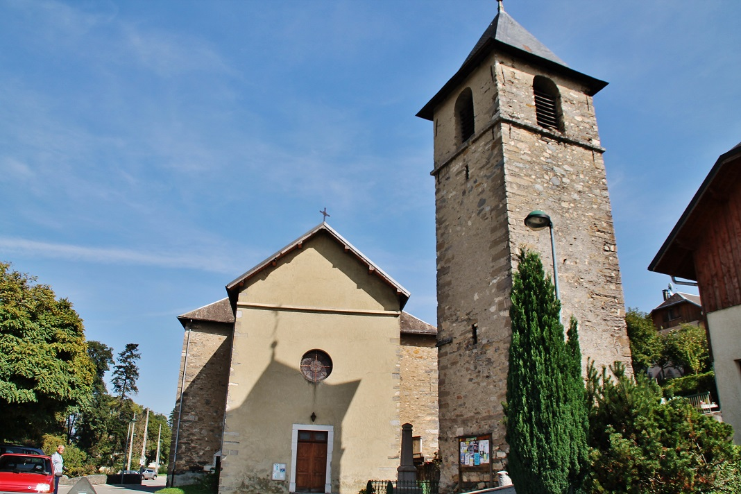 église St Pierre